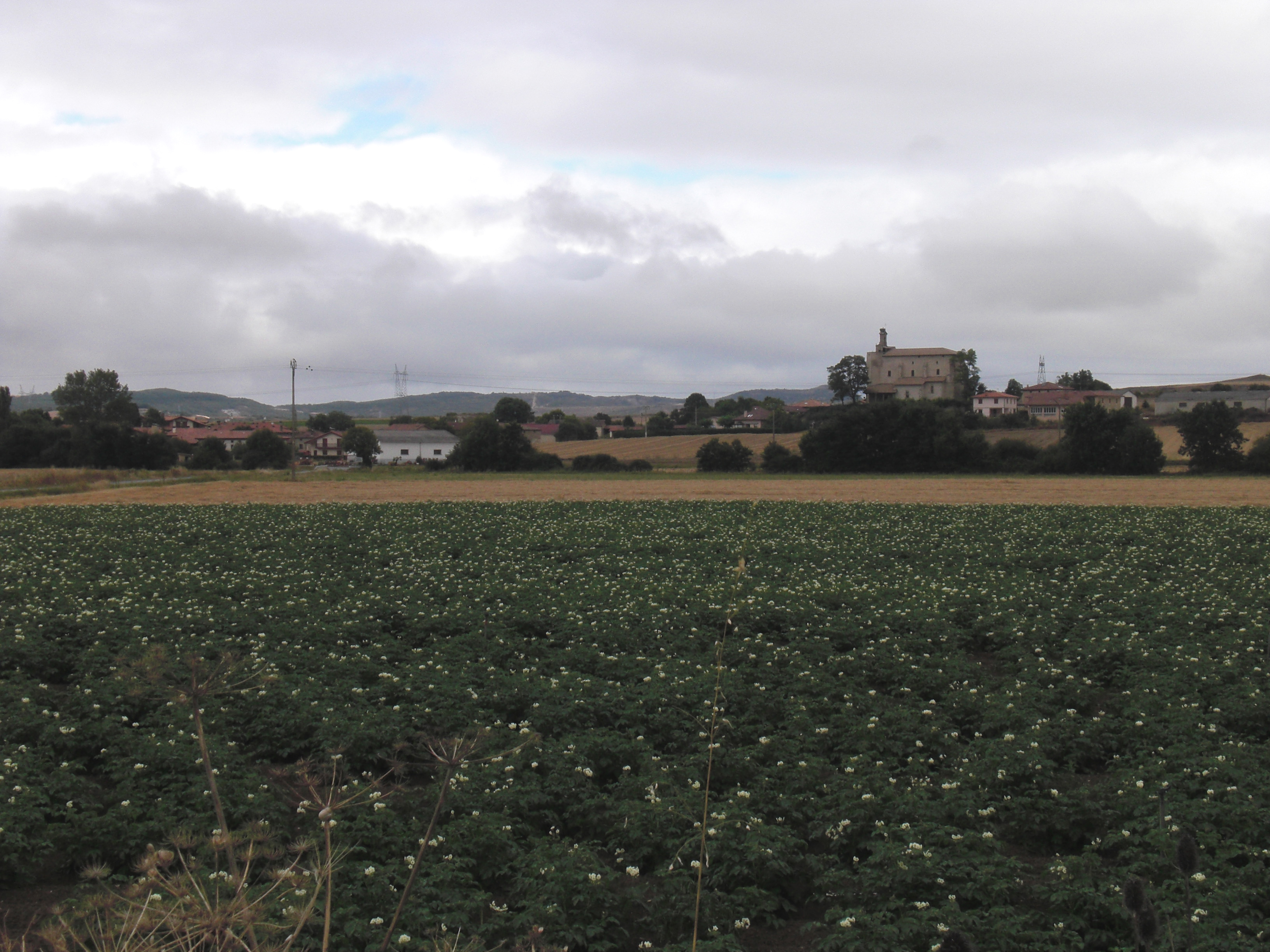 Burguko Arbuluko ikuspegia